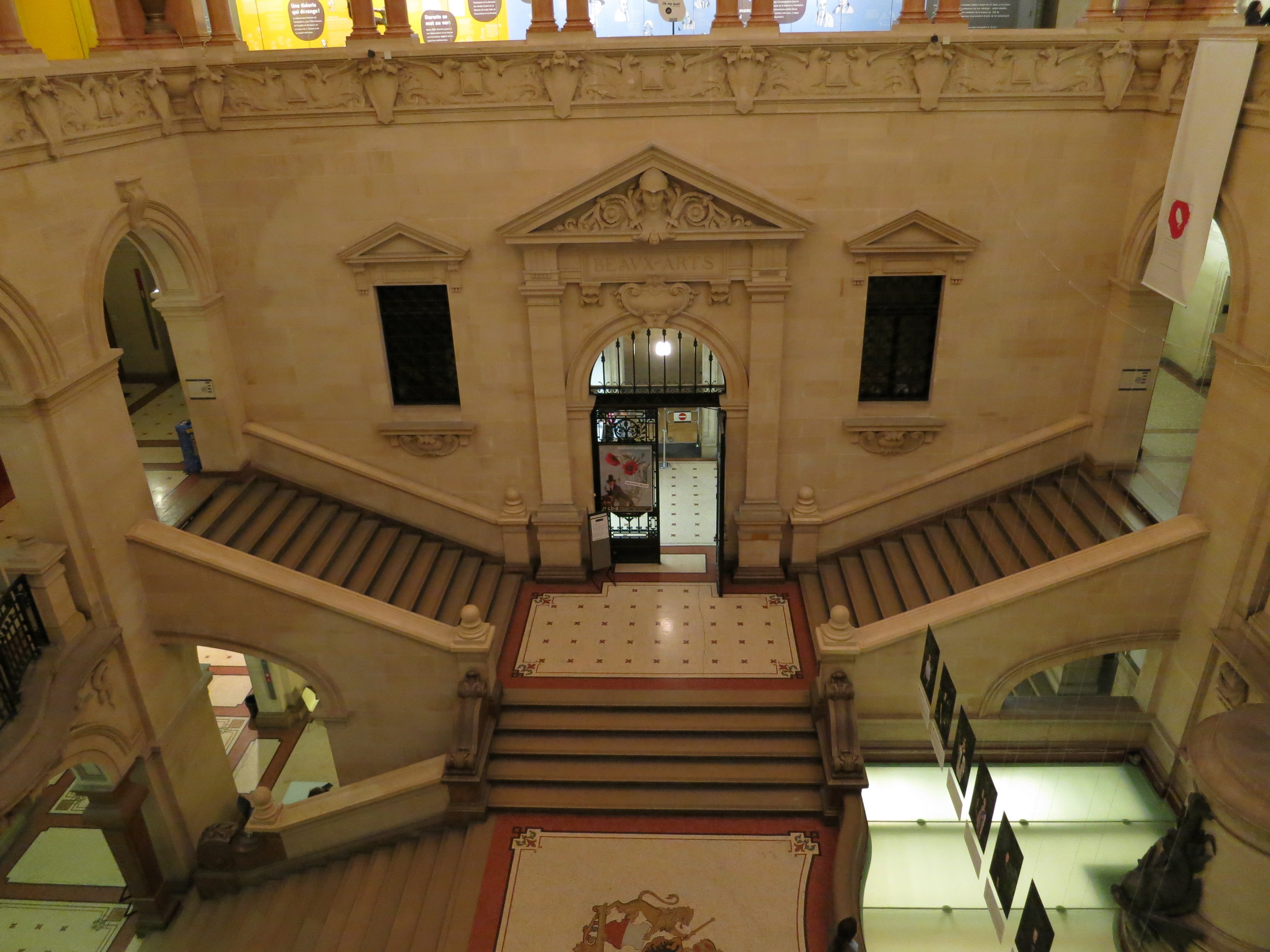 Kantonales Kunstmuseum (im Palais de Rumine)